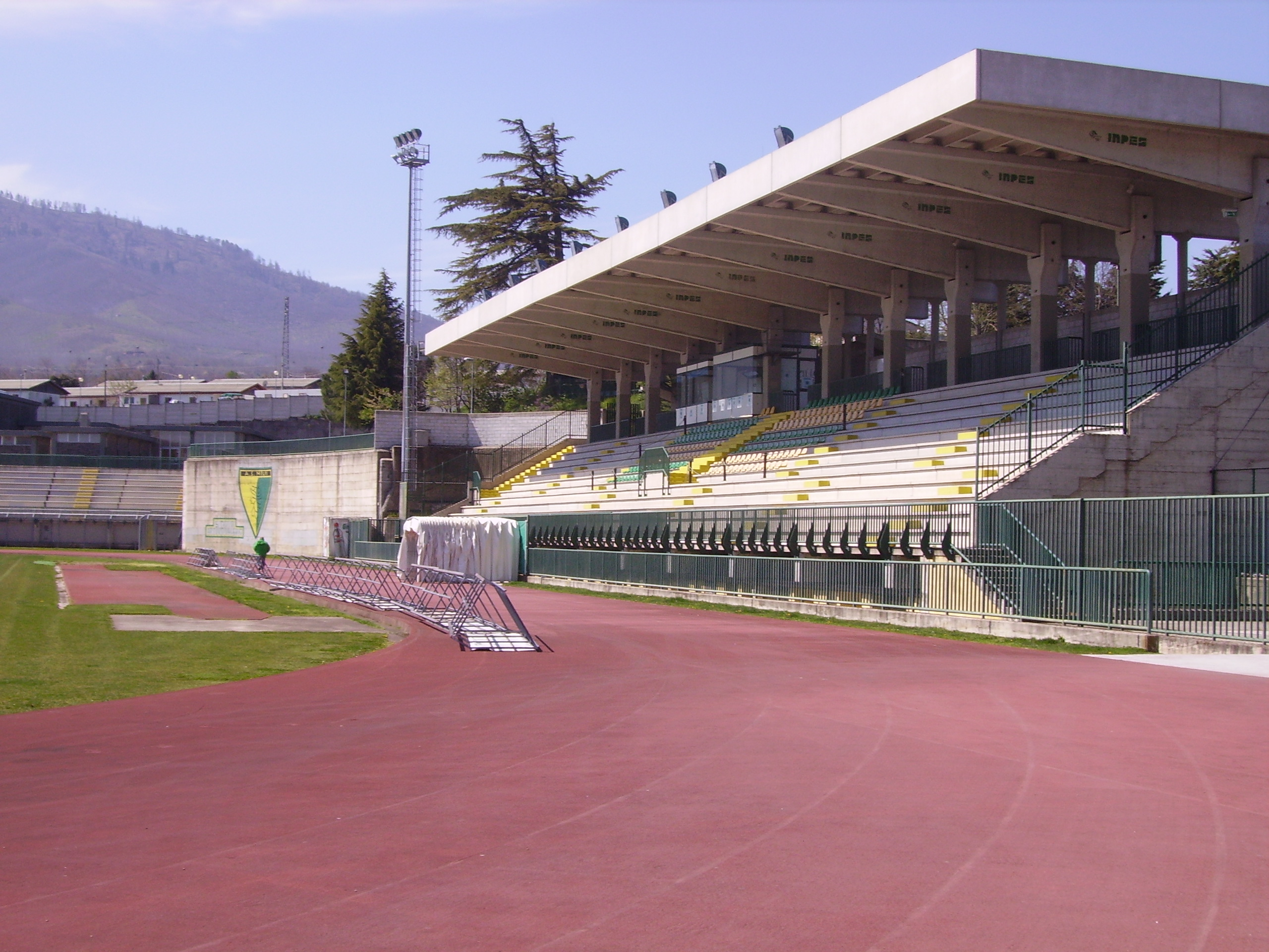 Tribuna centrale dello Stadio "Arturo Valerio" di Melfi